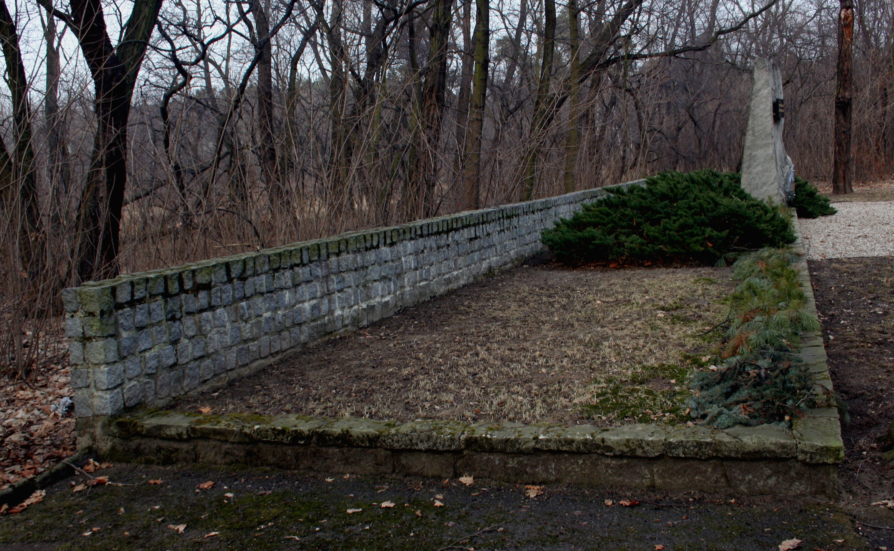 Rybnik-Wielopole miejsce stracenia 446 ofiar Marszu Śmierci